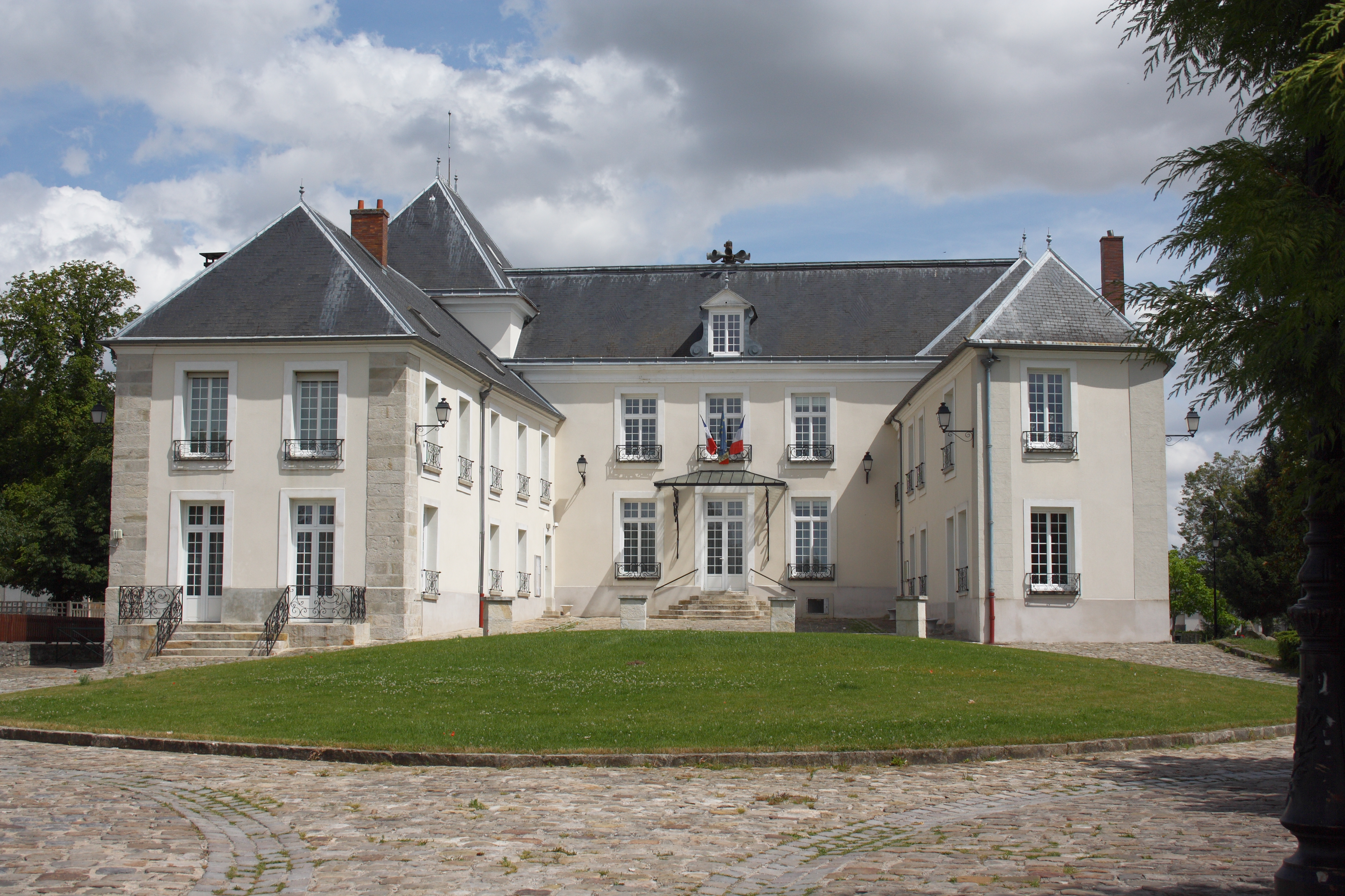 Mairie (Bürgermeisteramt) von Verneuil-l'Étang